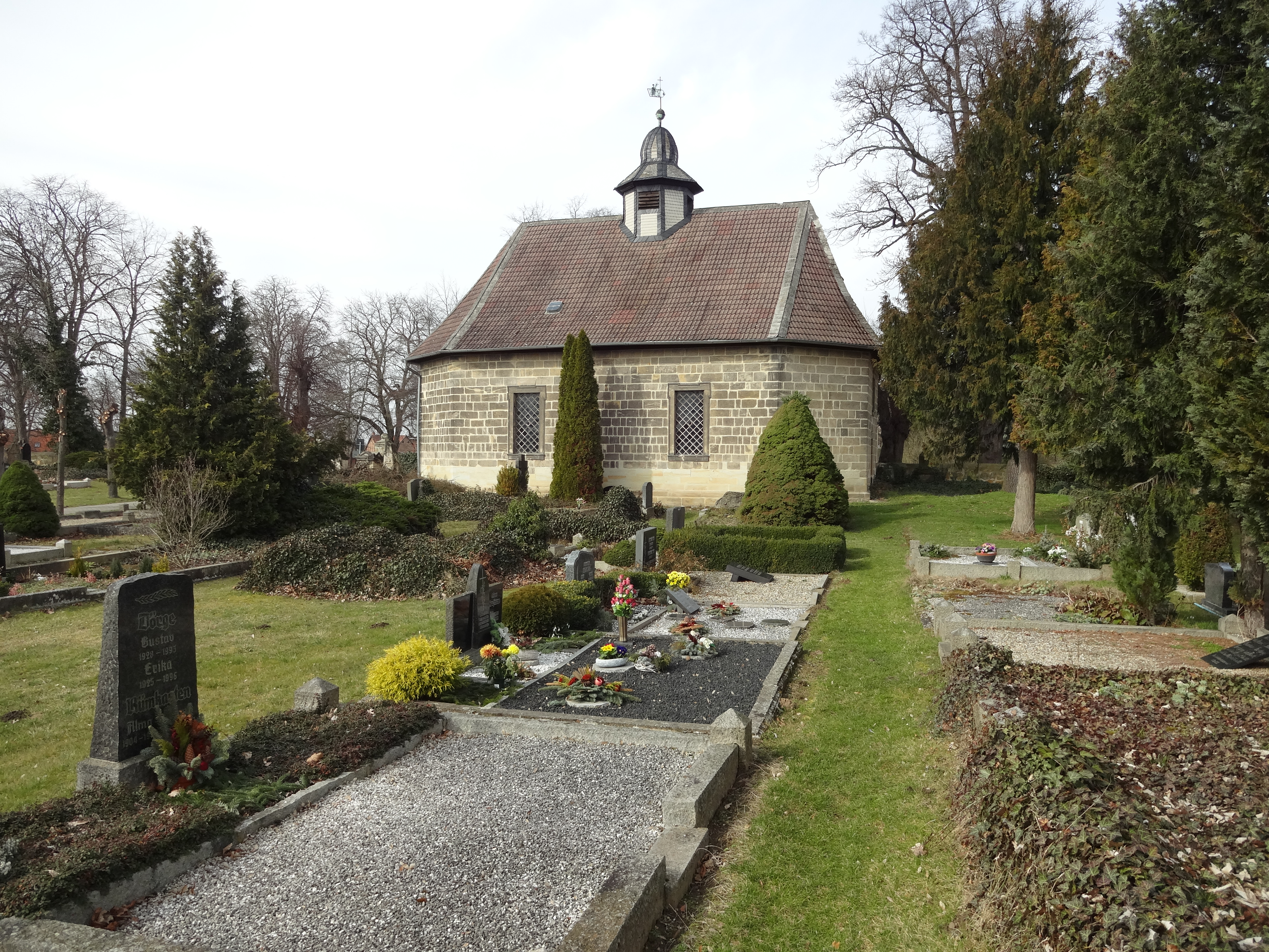 denkmalgeschützte Hospitalkapelle St. Katharina auf dem Friedhof in Derenburg, Ortsteil von Blankenburg (Harz)